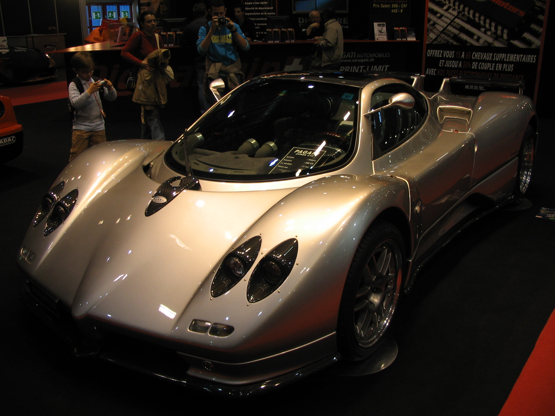 Pagani Zonda C12S (V12 AMG 7l 550 ch, 345 km/h), salon de Genève 2007.